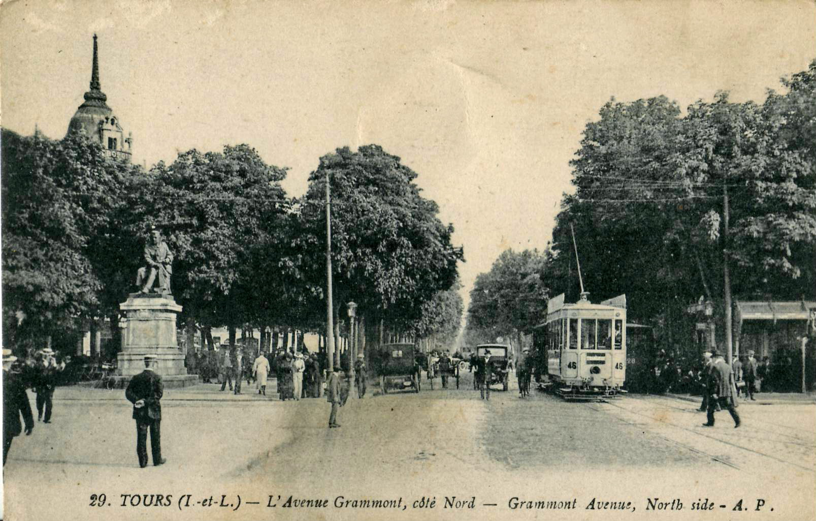 Carte postale éditée par Thiriat, n°AP 29 : TOURS - L'Avenue de Grammont, côté Nord Croisement de deux rames de l'ancien Tramway de Tours (motrice 46 tractant une remorque, et motrice 28) Le même cliché est publié par A. Papeghin sous référence AP 134